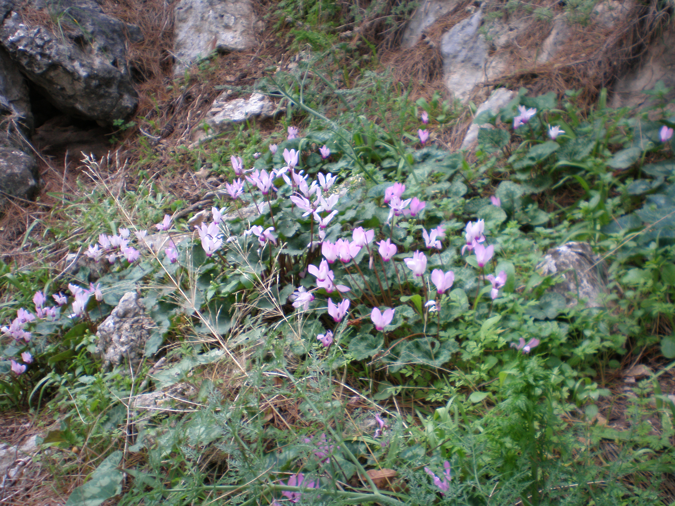 Taken in Ya'ar Hakdushim (יער הקדושים), Israel, January 20, 2007.